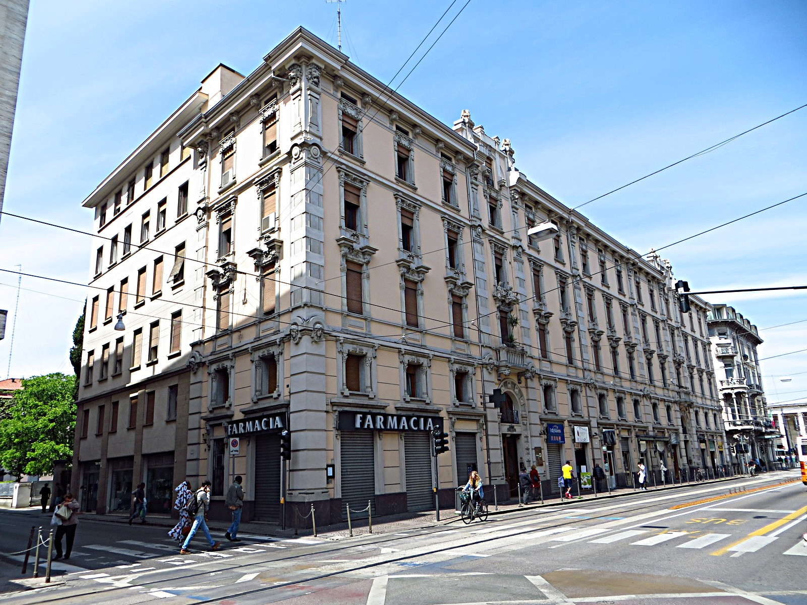 Corso del Popolo